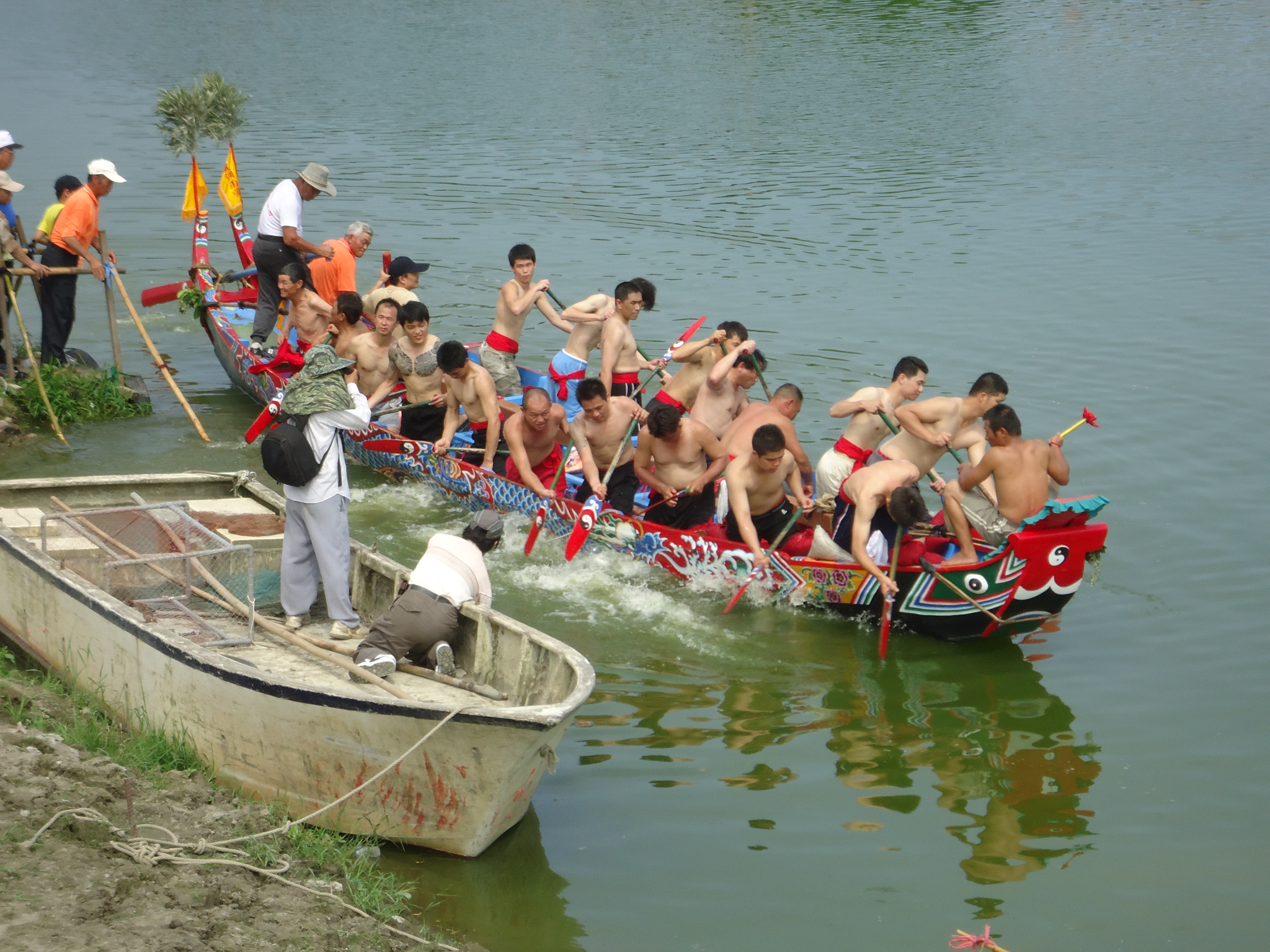 二龍村龍舟-洲仔尾。